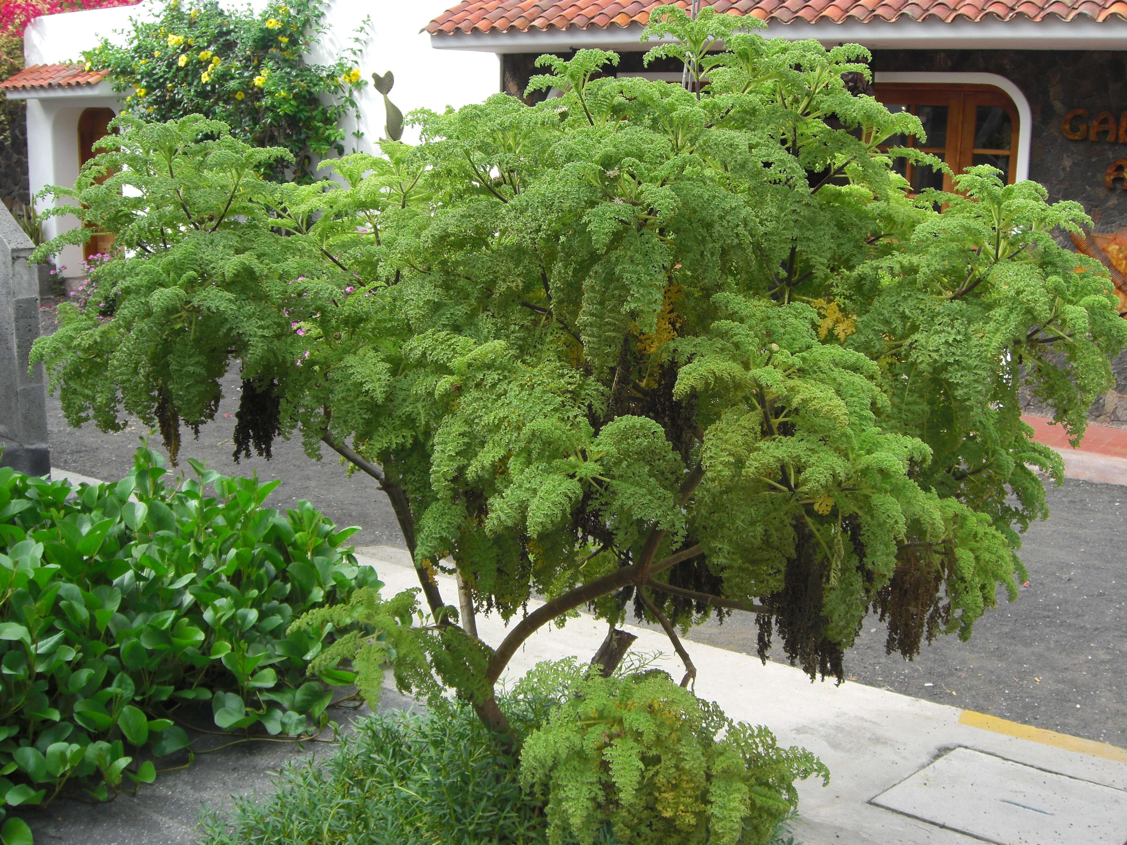 Scalesia helleri (endemic genus) ornamental, Santa Cruz Island, Galápagos, 20130129-45